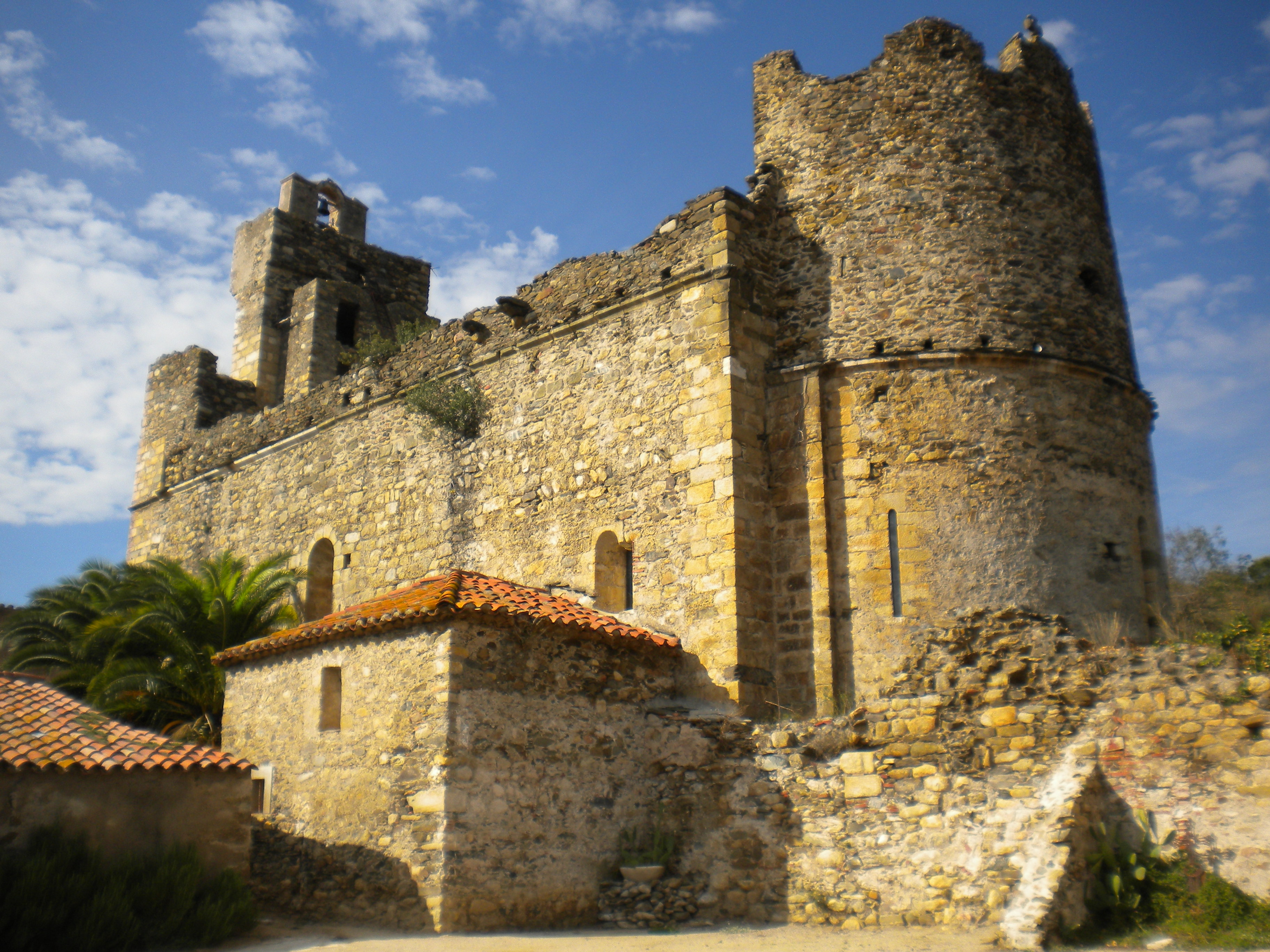 Vista posterior de l'església de Sant Julià i Santa Basilissa, al municipi alt-empordanès de Rabós.